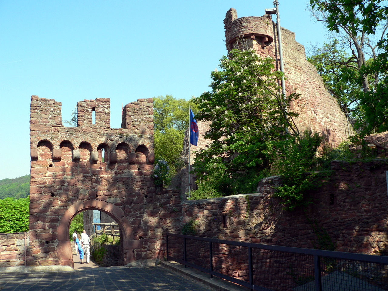 Die Clingenburg oberhalb von Klingenberg am Main, Germany